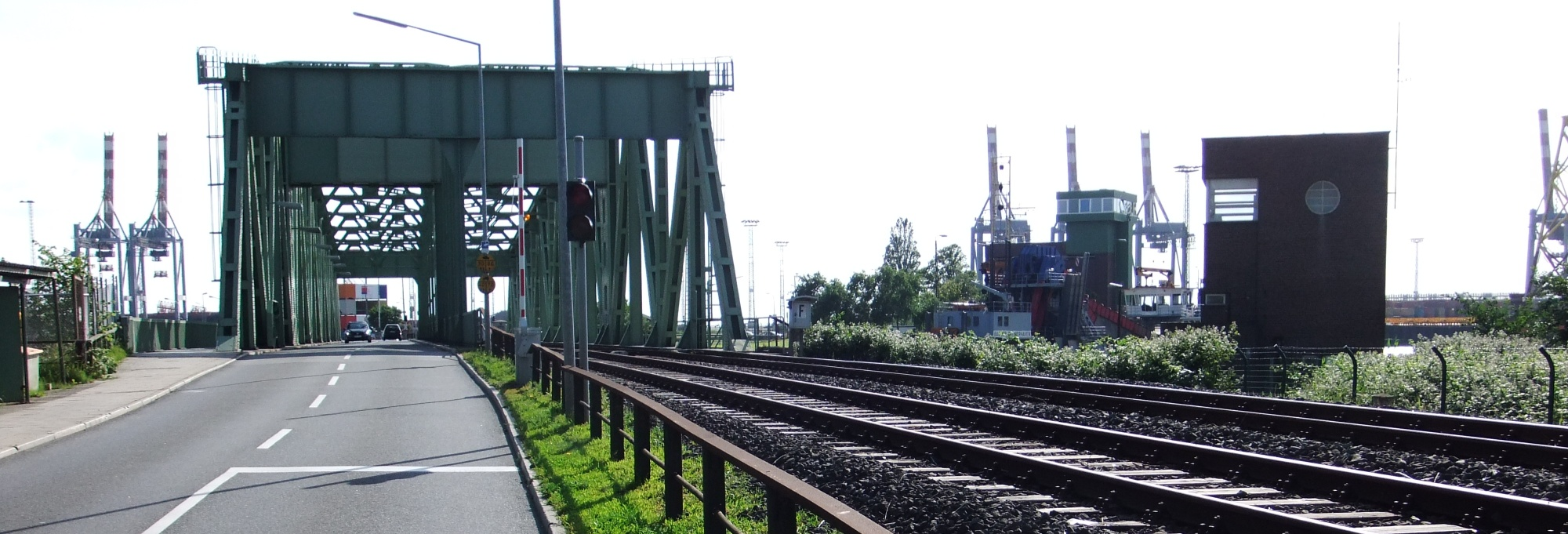 Nordschleusenbrücke, 1 von 2 Maschinenhäuser Nordschleuse, Stellwerk, in Bremerhaven, An der Nordschleuse 2. Die Denkmalgruppe ist ein geschütztes Kulturdenkmal in der Freien Hansestadt Bremen, mit der Nr. 1526 beim Landesamt für Denkmalpflege registriert.